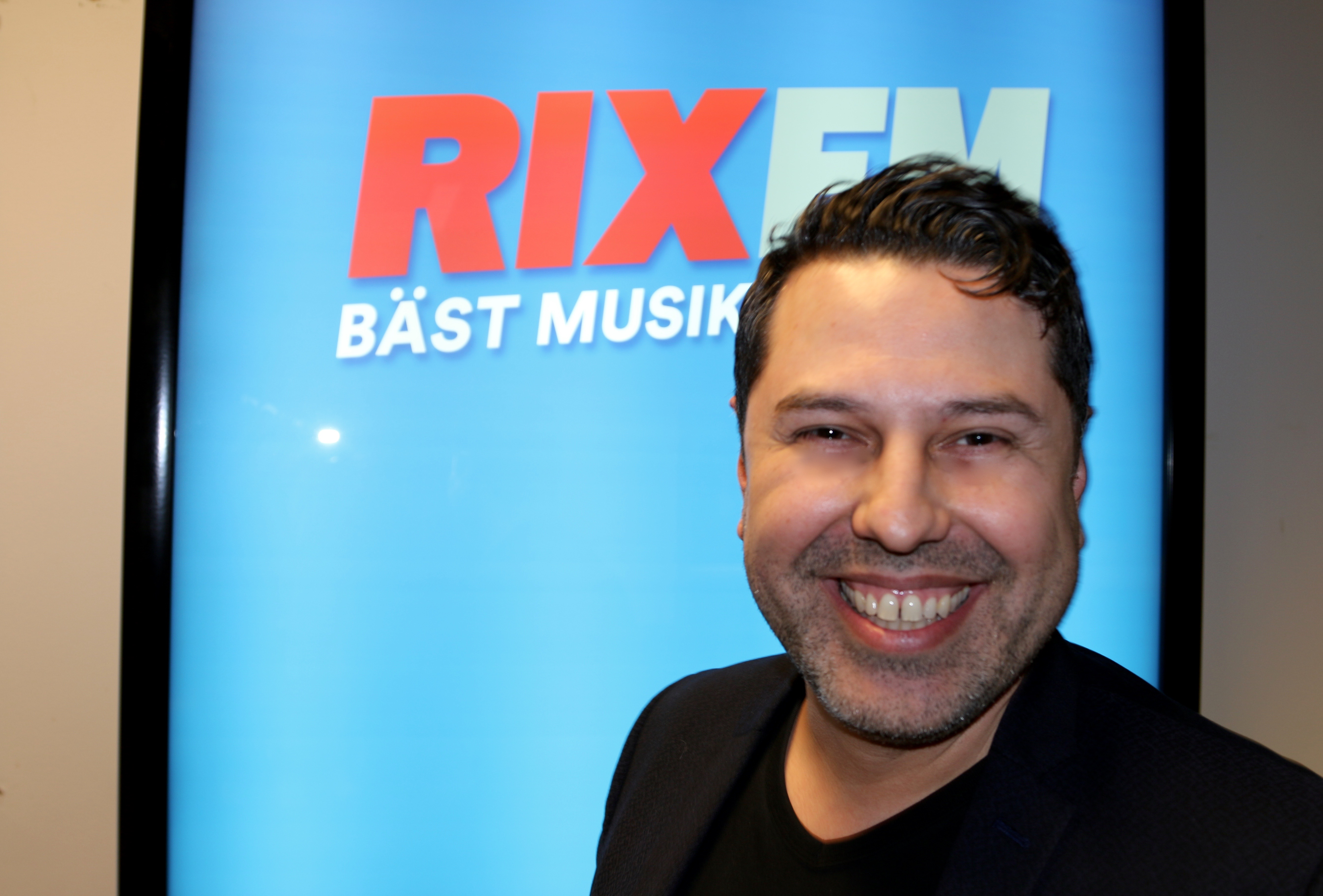 Sebastian Voght, dec 2016